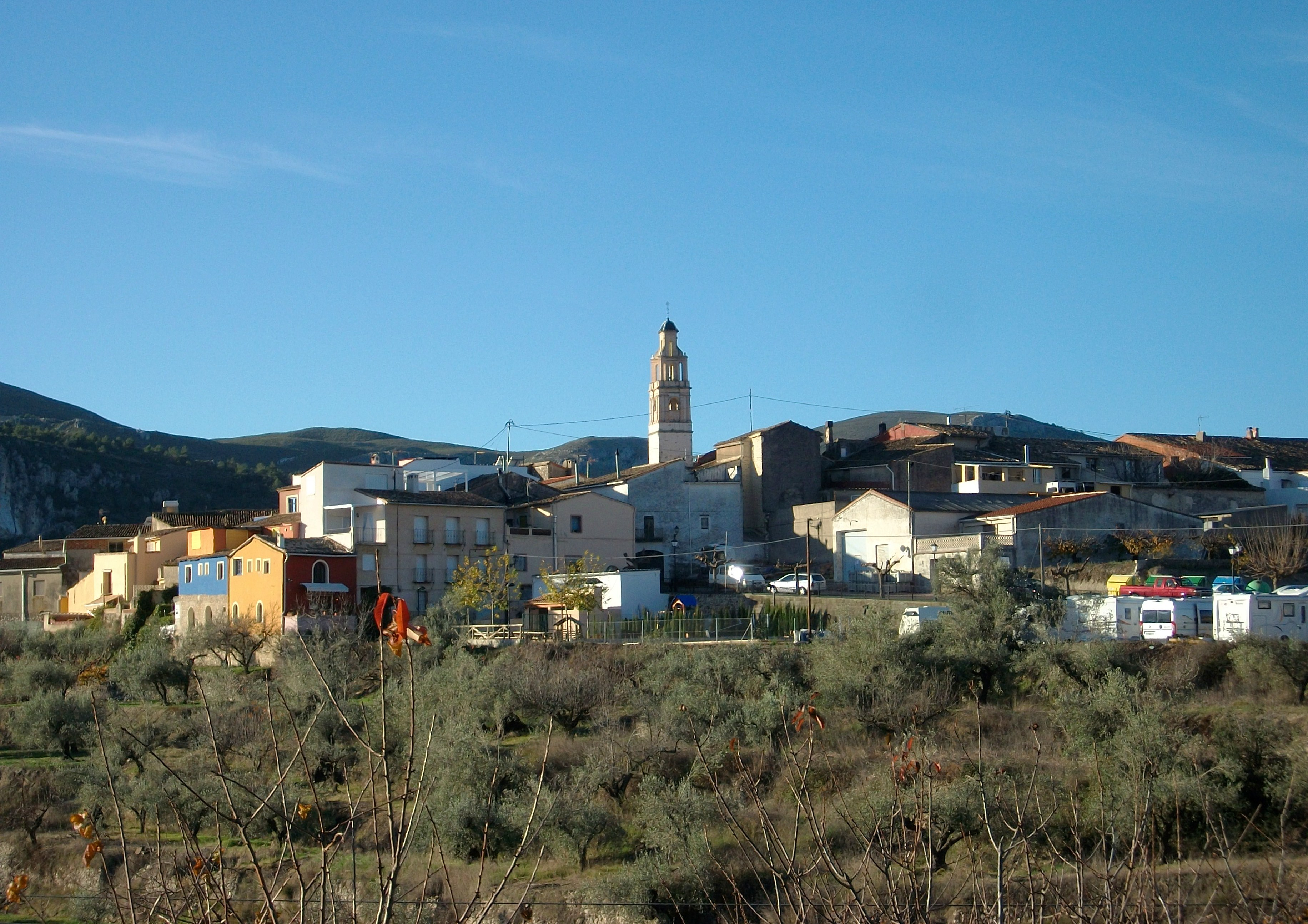 Margarida, el Comtat.